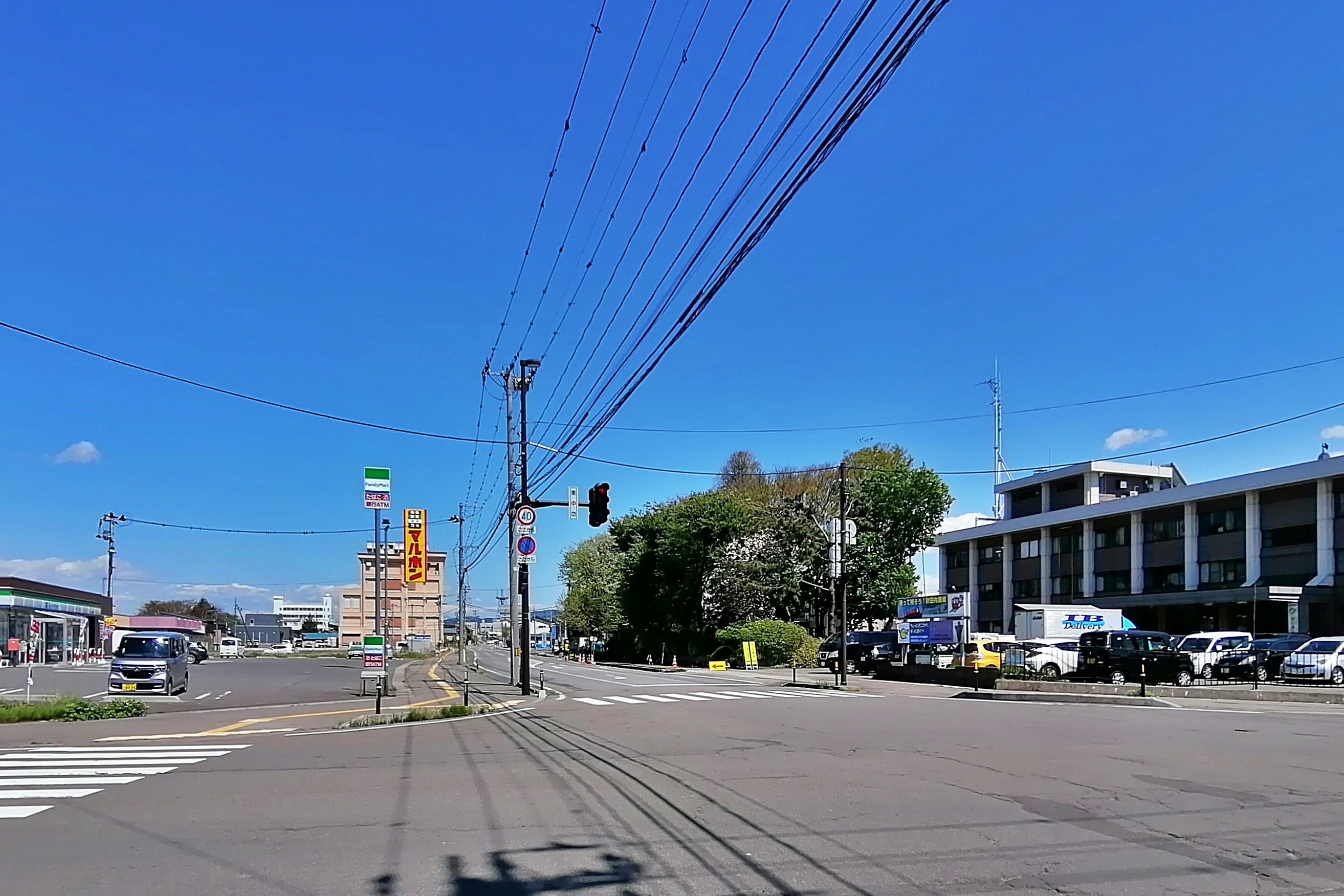 東中岱交差点：北秋田市鷹巣